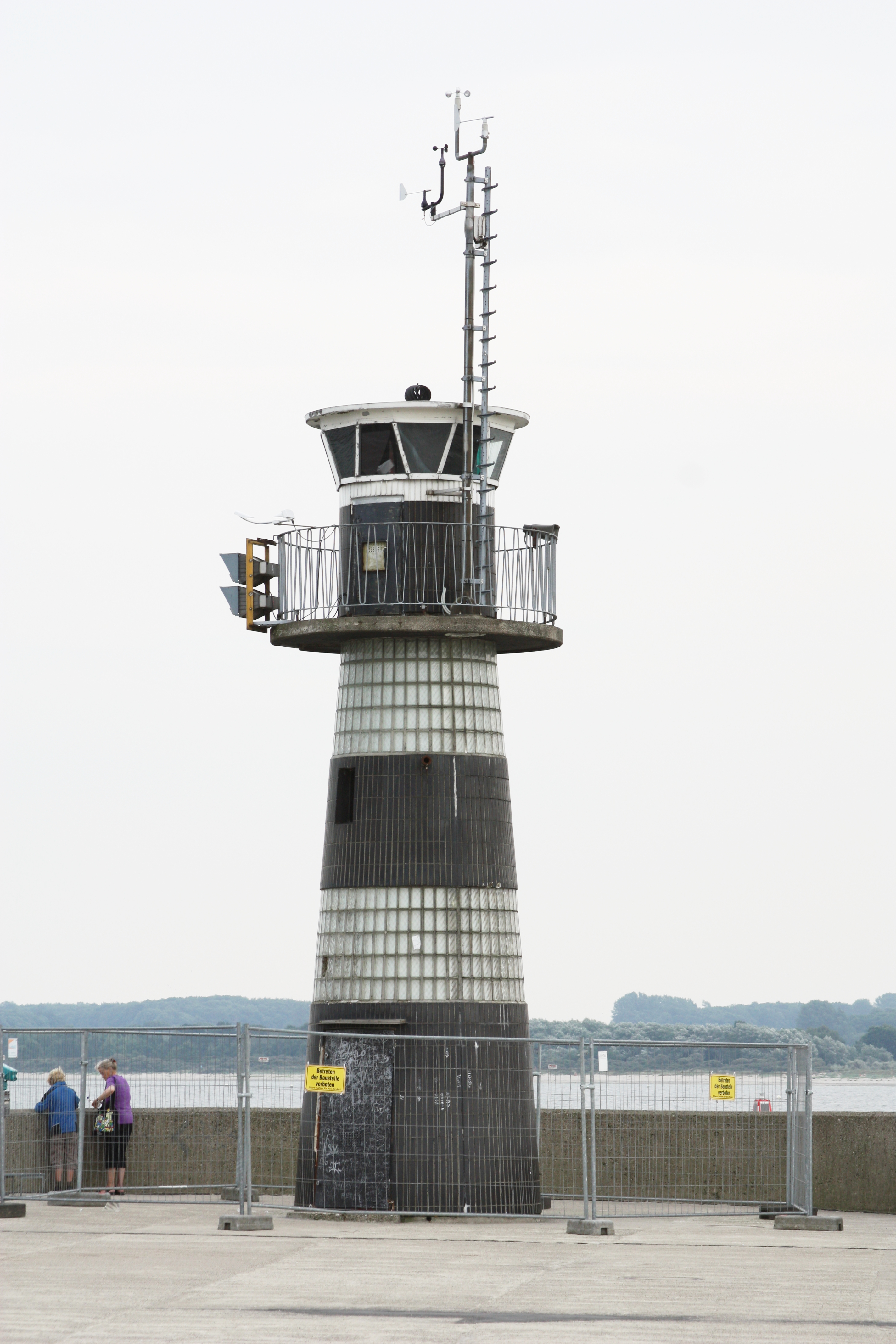 Travemünde